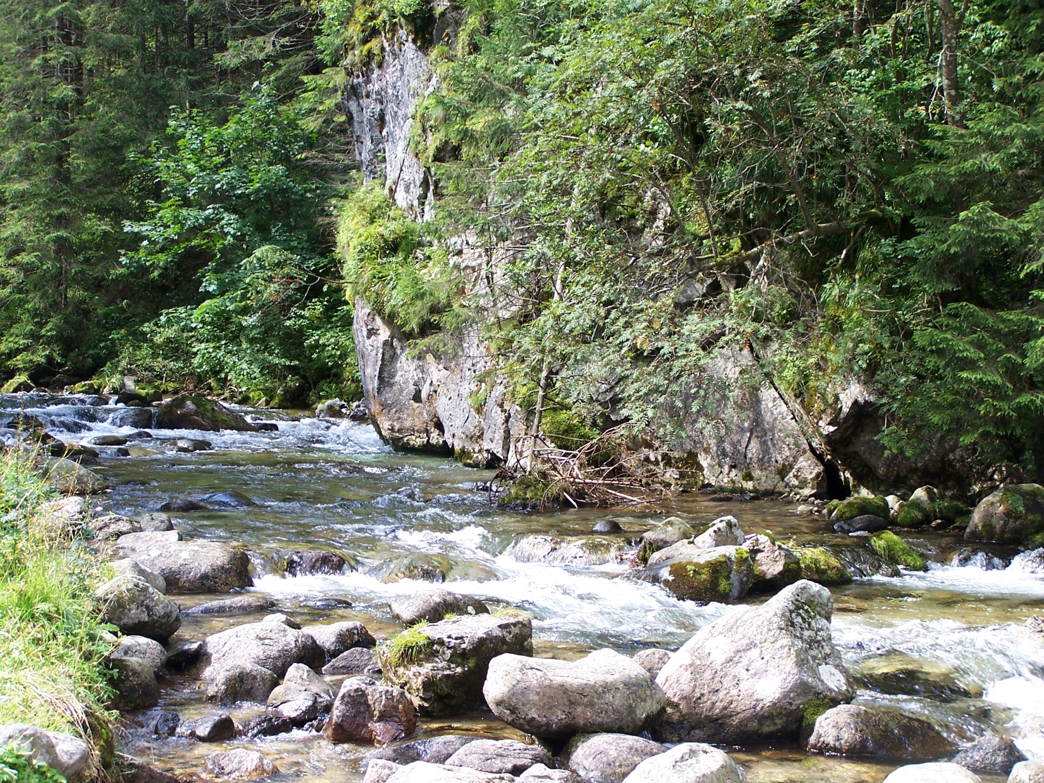 Potok Chochołowski w środkowej części doliny (powyżej Polany pod Jaworki)